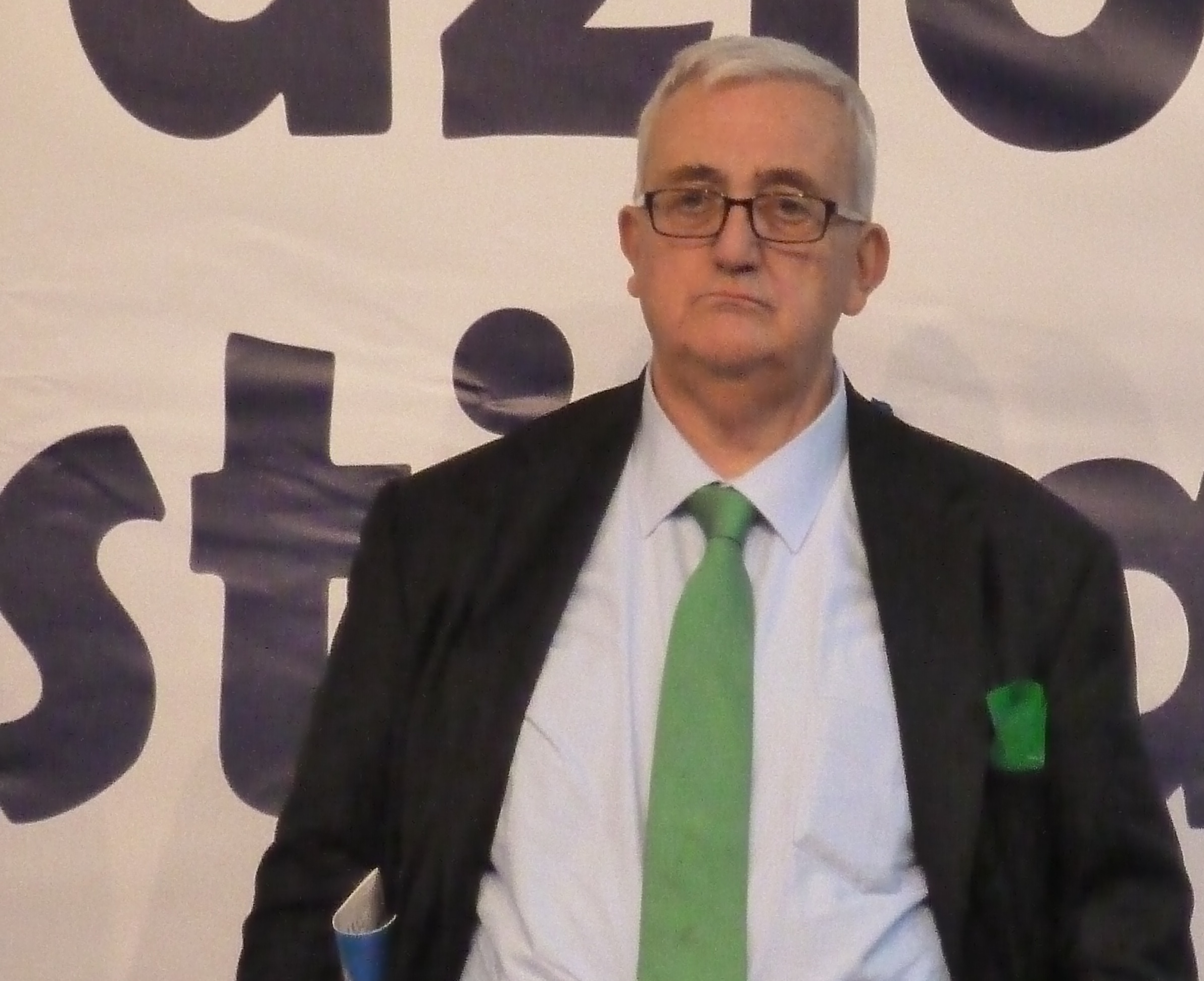 Manifestazione Lega Nord a Torino contro l'immigrazione clandestina.